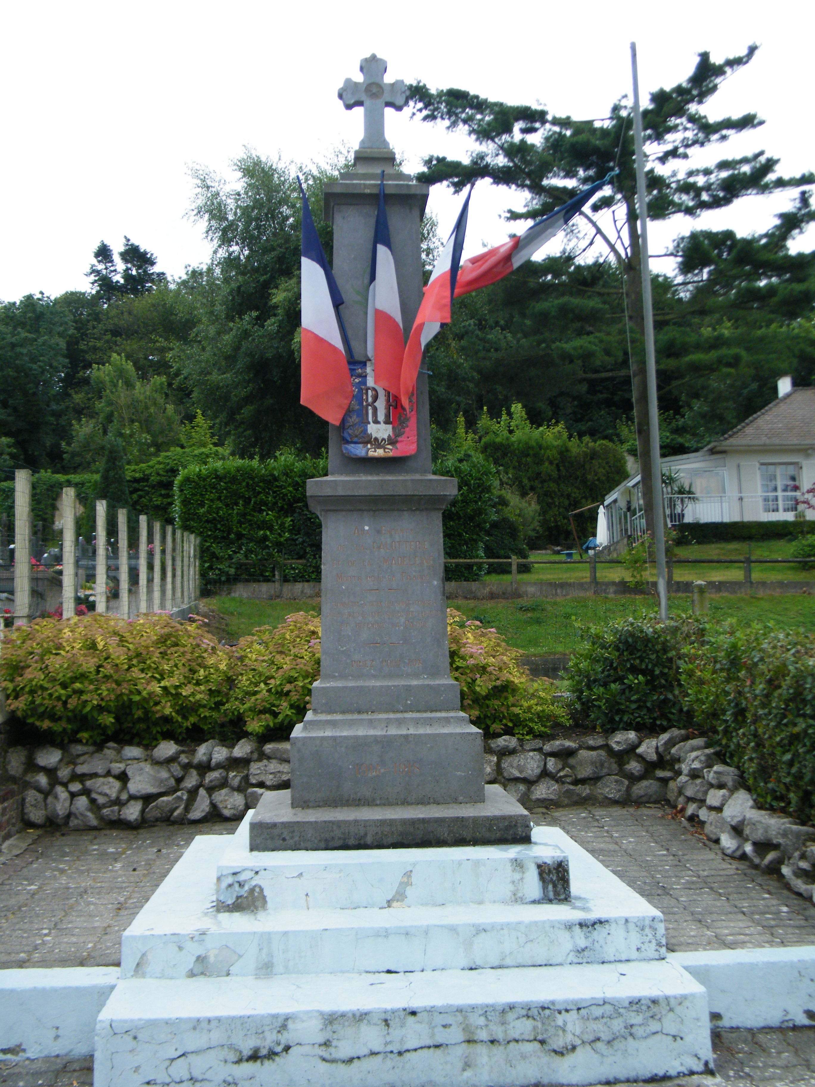 Monument, La Calotterie, Pas-de-Calais, France